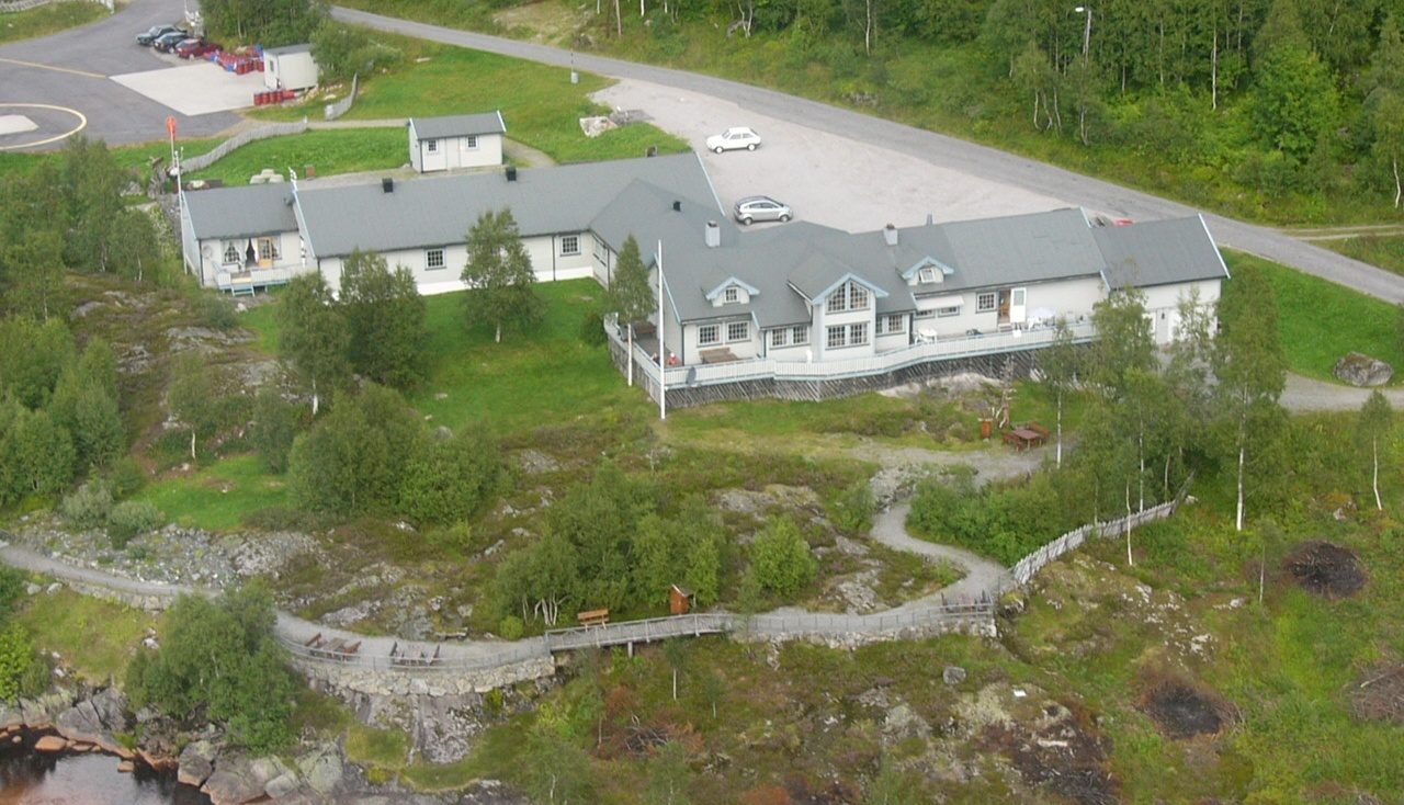 Ljosland Fjellstove ano 2010